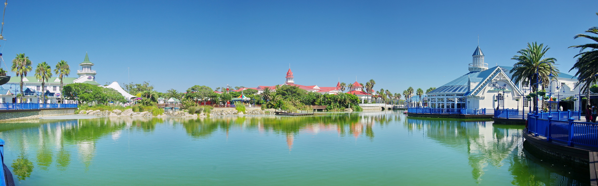 Boardwalk Port Elizabeth